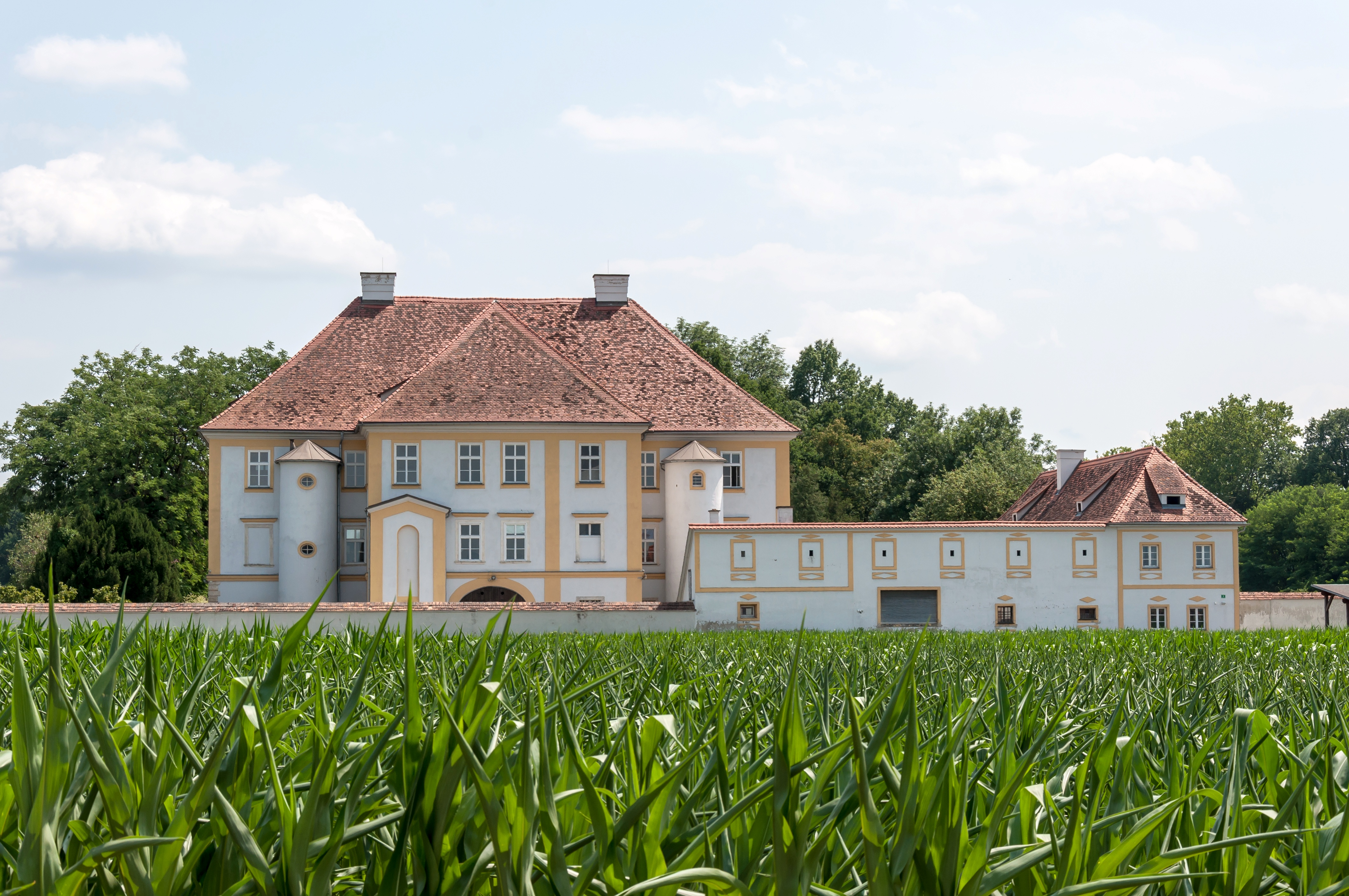 Sog. Neuschloss